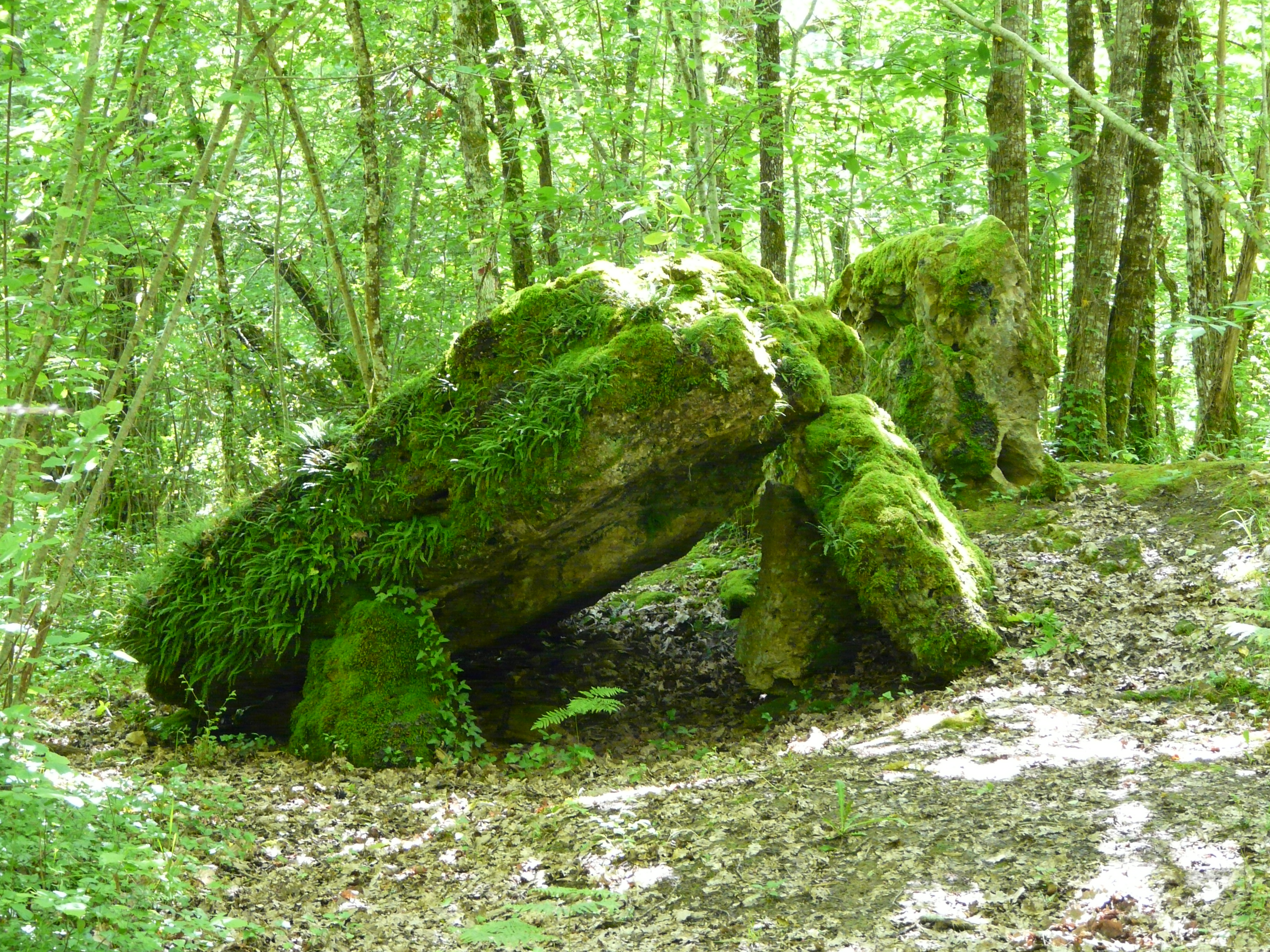 Le dolmen de la Pierre Levée, Beauregard-et-Bassac, Dordogne, France.